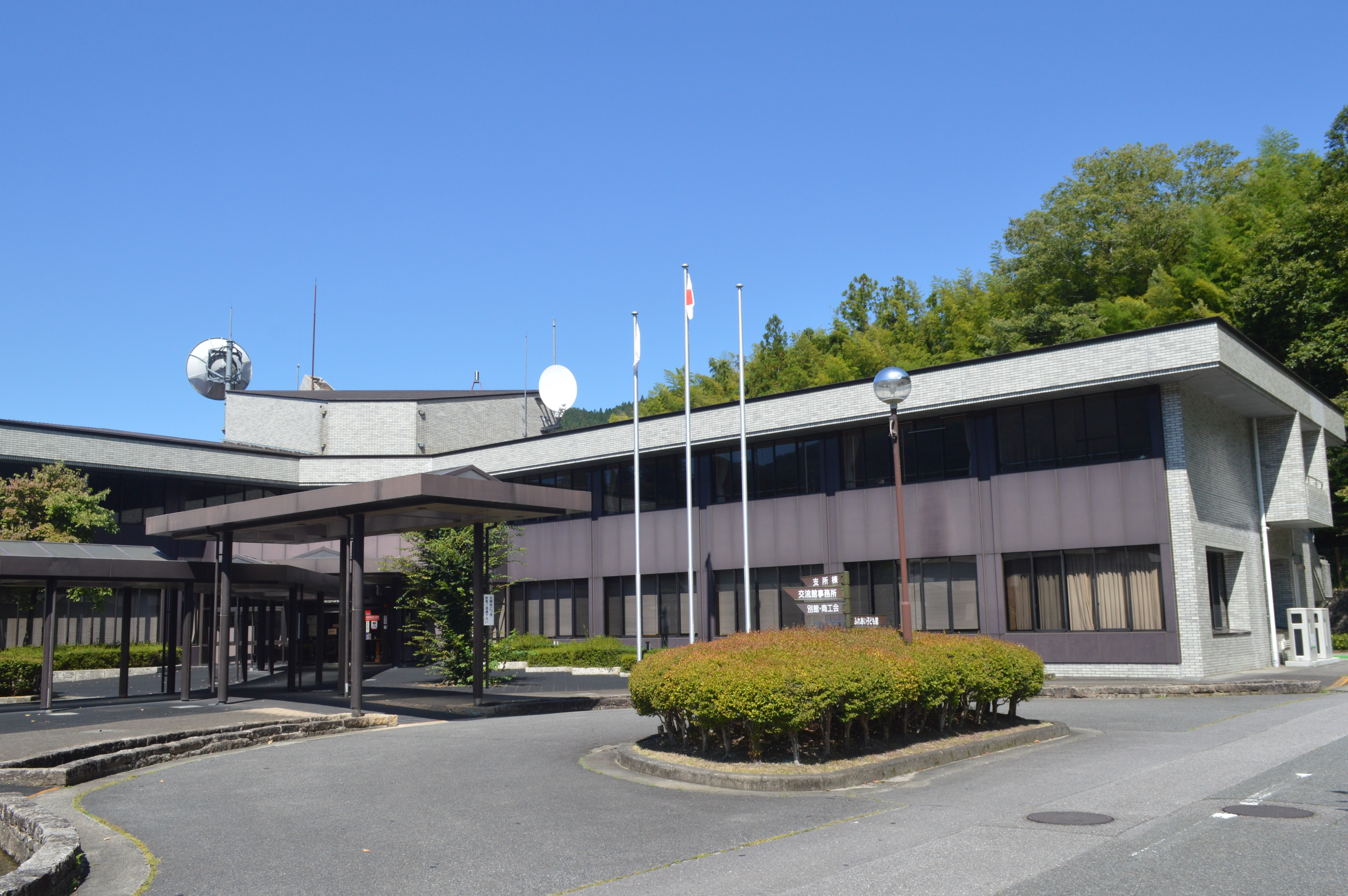 愛知県豊田市稲武町にある豊田市役所稲武支所。